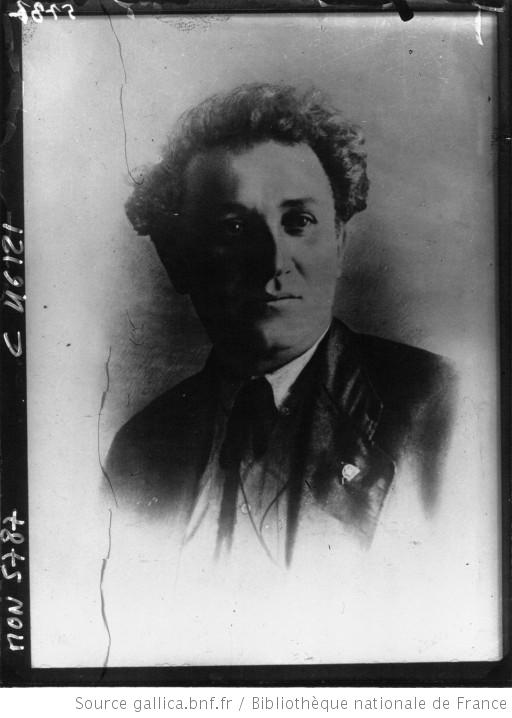 Gregori Zinoviev en 1932.